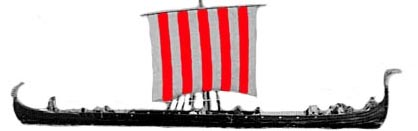 viking ship image uwe kils